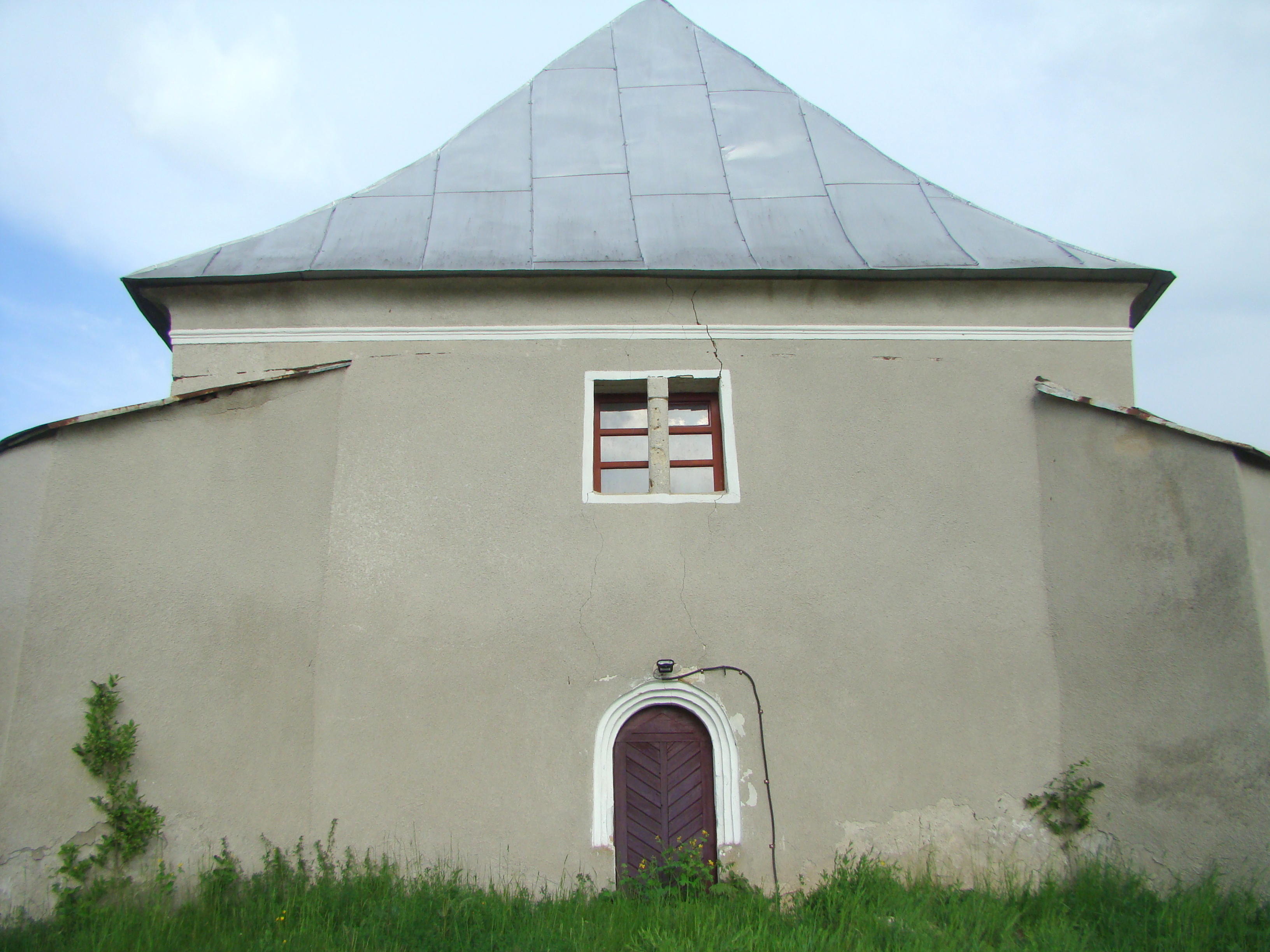 Biserica reformată, sat Strugureni; comuna Chiochiș 01